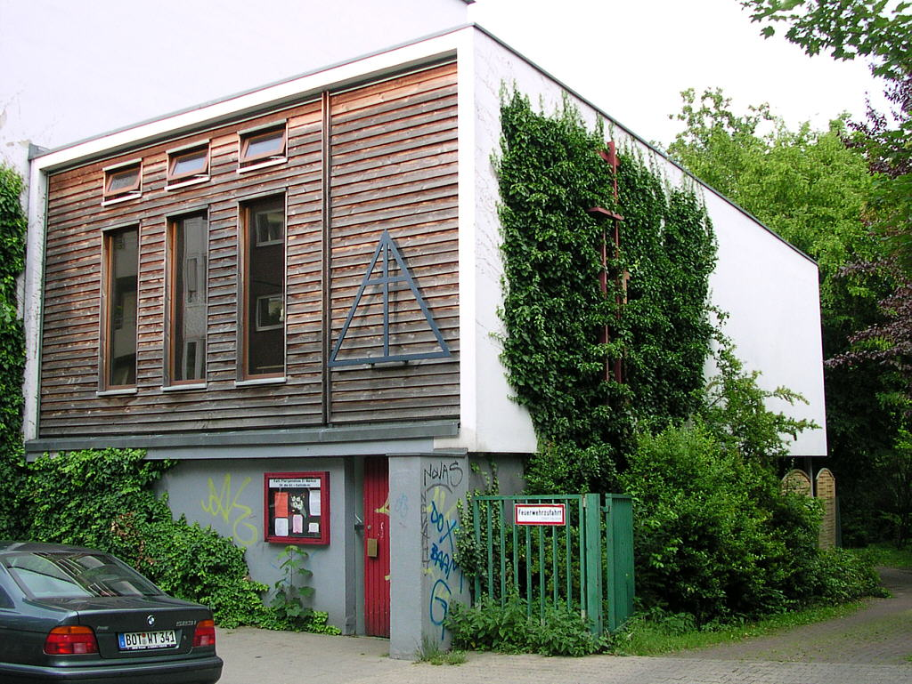 Aachen, Brabantstraße, "katholische Pfarrgemeinde St. Markus für die Alt-Katholiken"